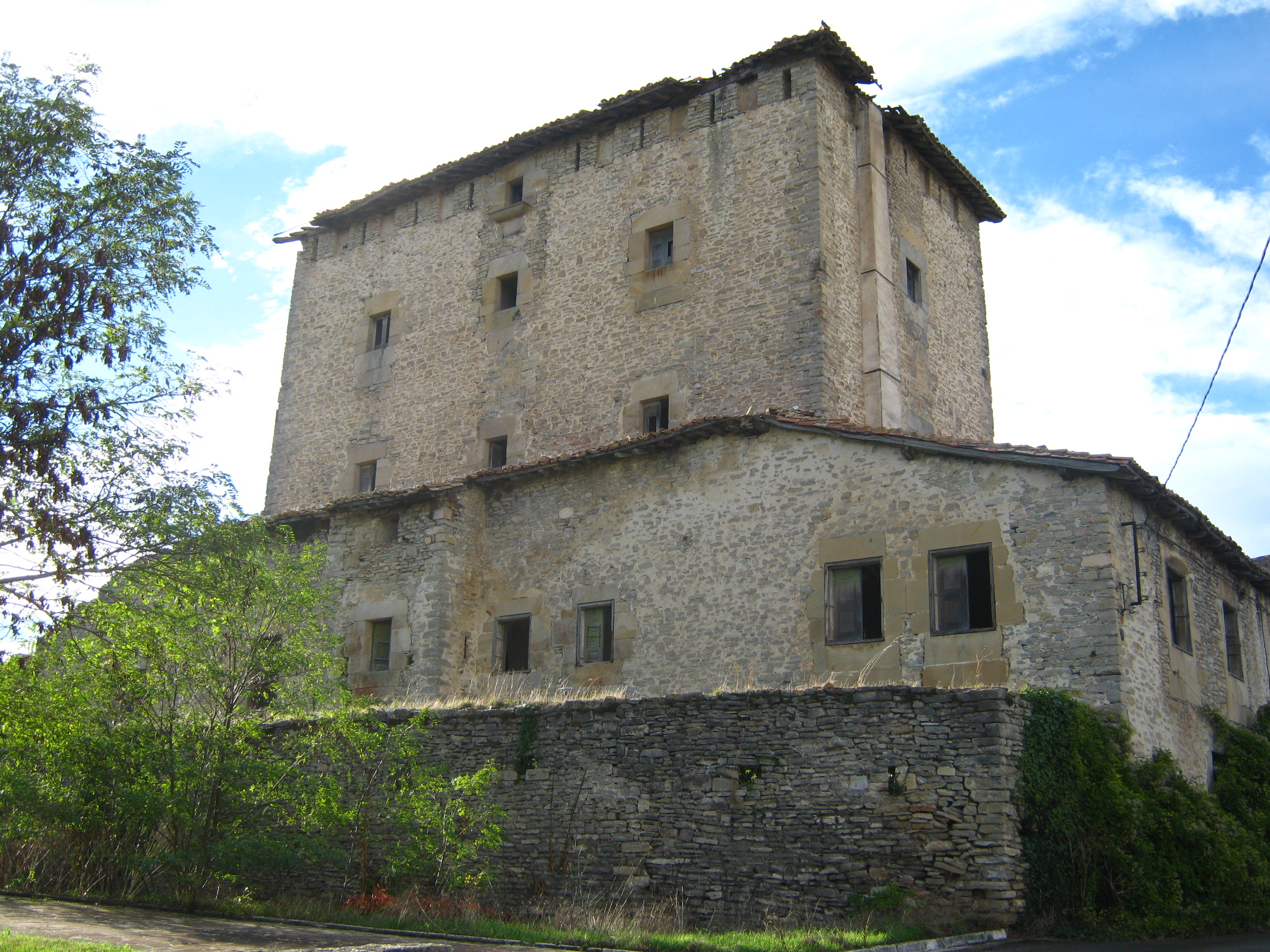 Torre de los Hurtado de Mendoza en Mártioda (Álava, España)